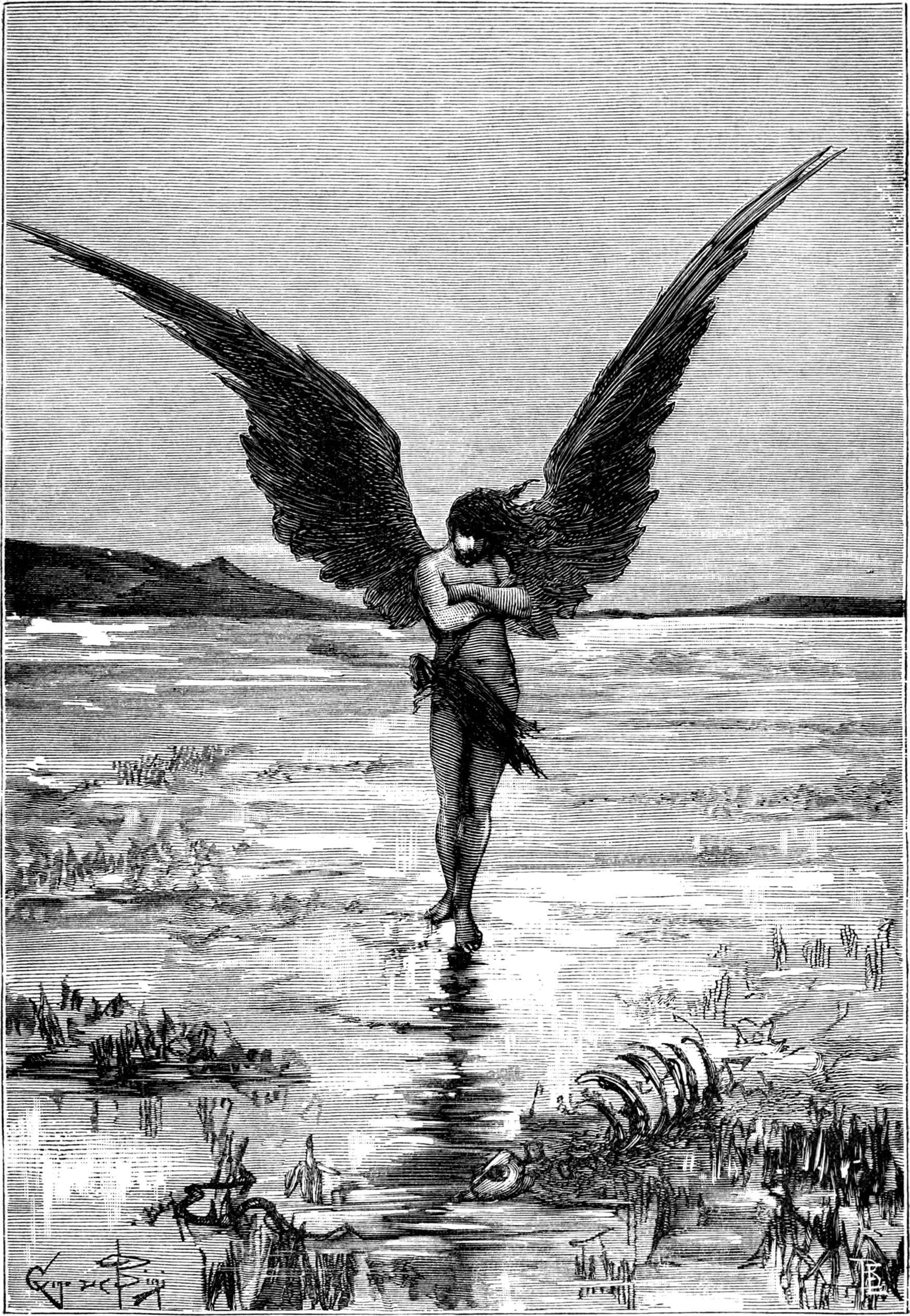 Illustrazione da Lucifero. Poema di Mario Rapisardi. Quarta Edizione corretta nuovamente dall'Autore e illustrata da 40 disegni di Gino De' Bini. Roma, Edoardo Perino editore, 1887.